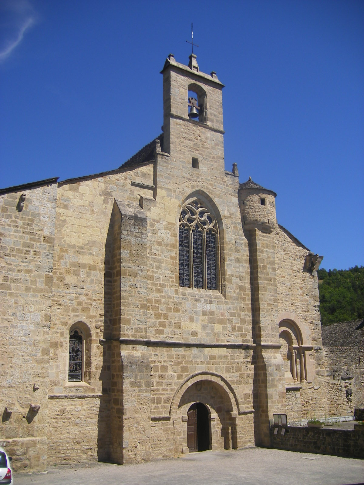 Saint-Sauveur-de-Chirac church in Le Monastier-Pin-Moriès (wrong filename)